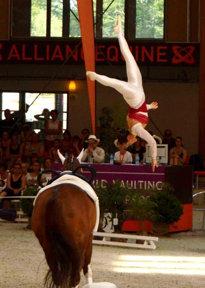 Anna Cavallaro con l'uscita da cavallo con la ruota senza